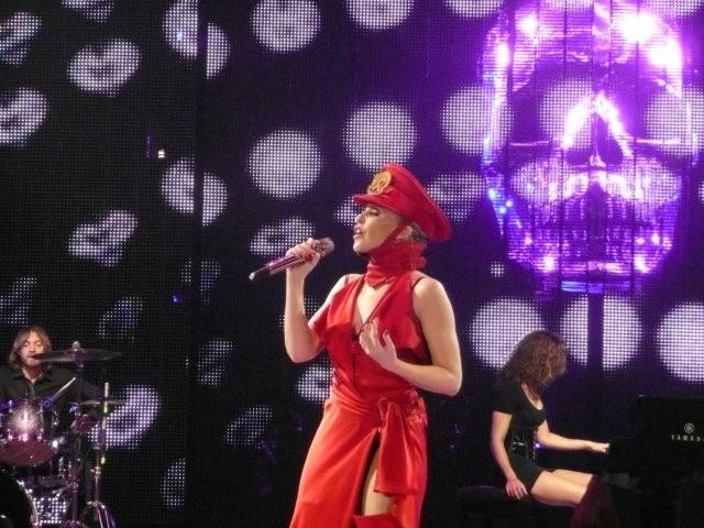 KylieX2008